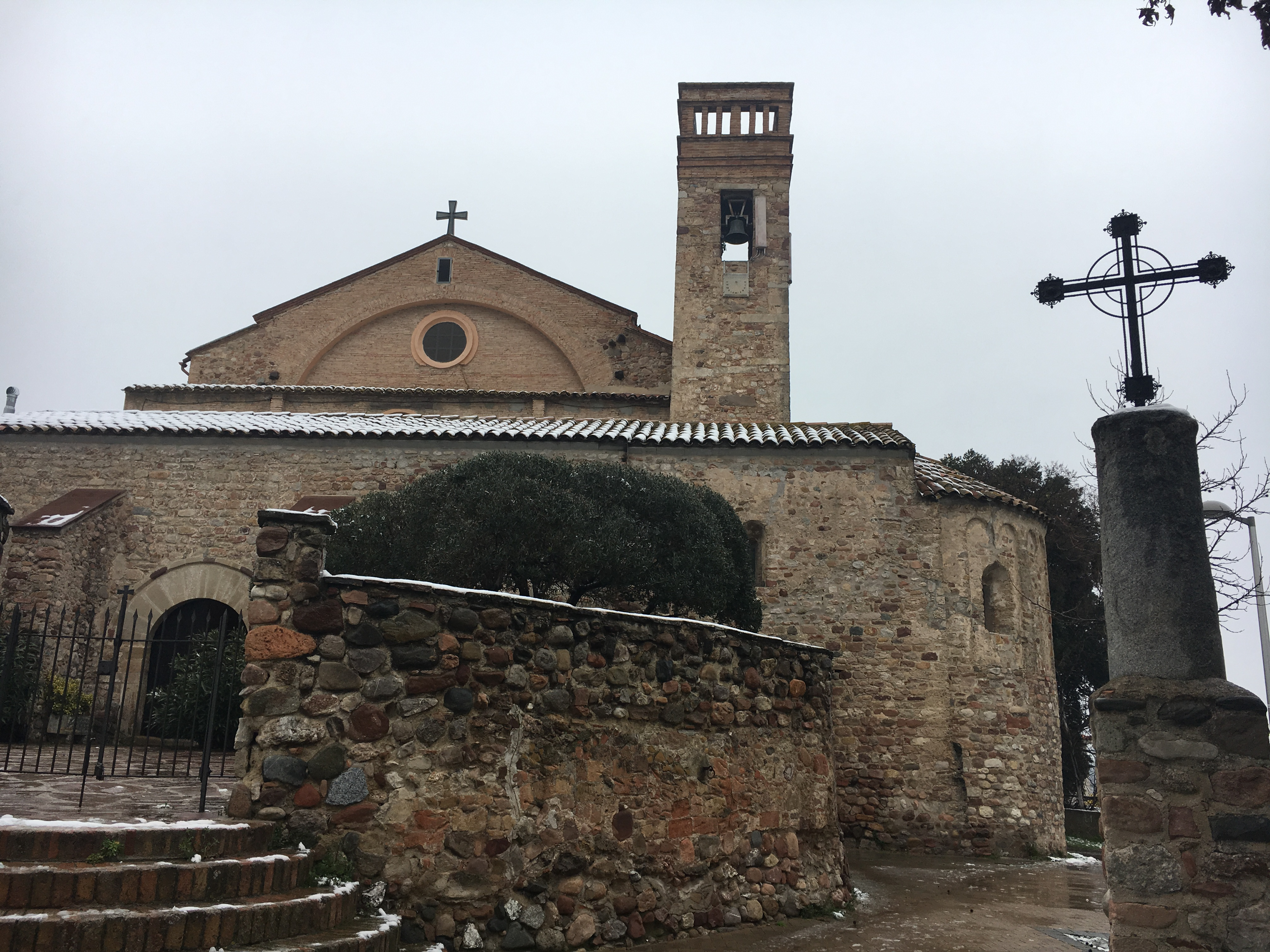 Vista general de la Iglesia